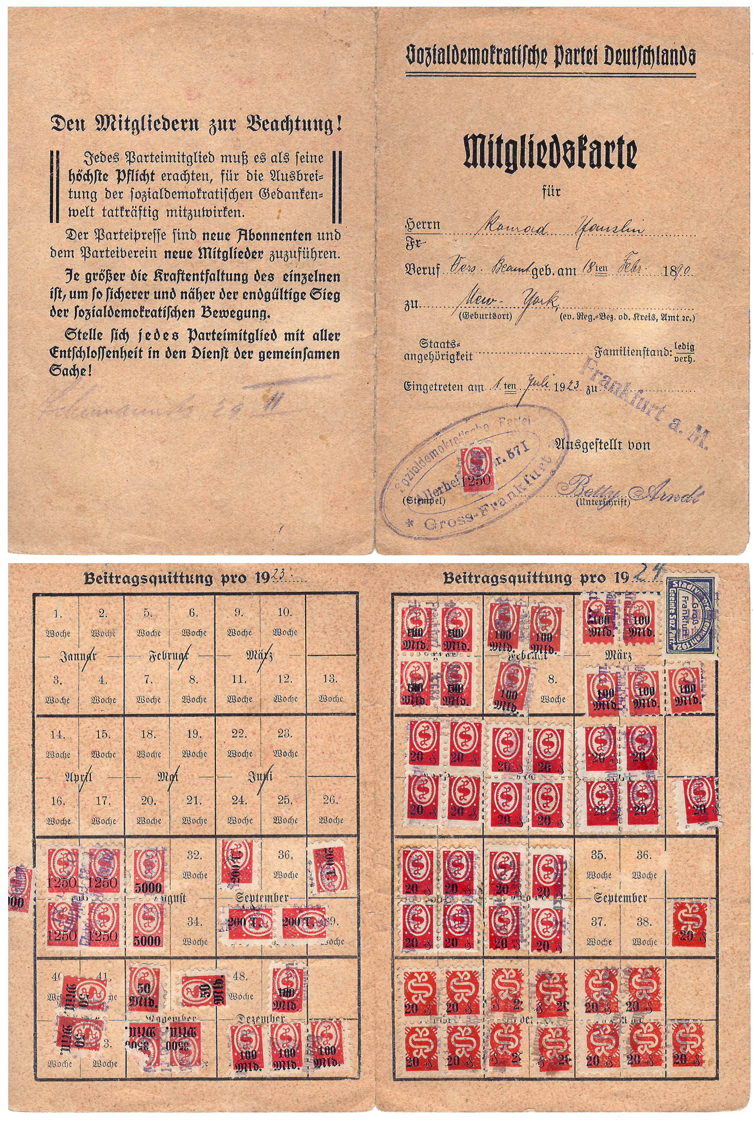 Mitgliedskarte Sozialdemokratische Partei Deutschlands (SPD) für den Versicherungskaufmann Konrad Hanslin (1890-1969); ausgestellt 1923; mit Unterschrift von Betty Arndt